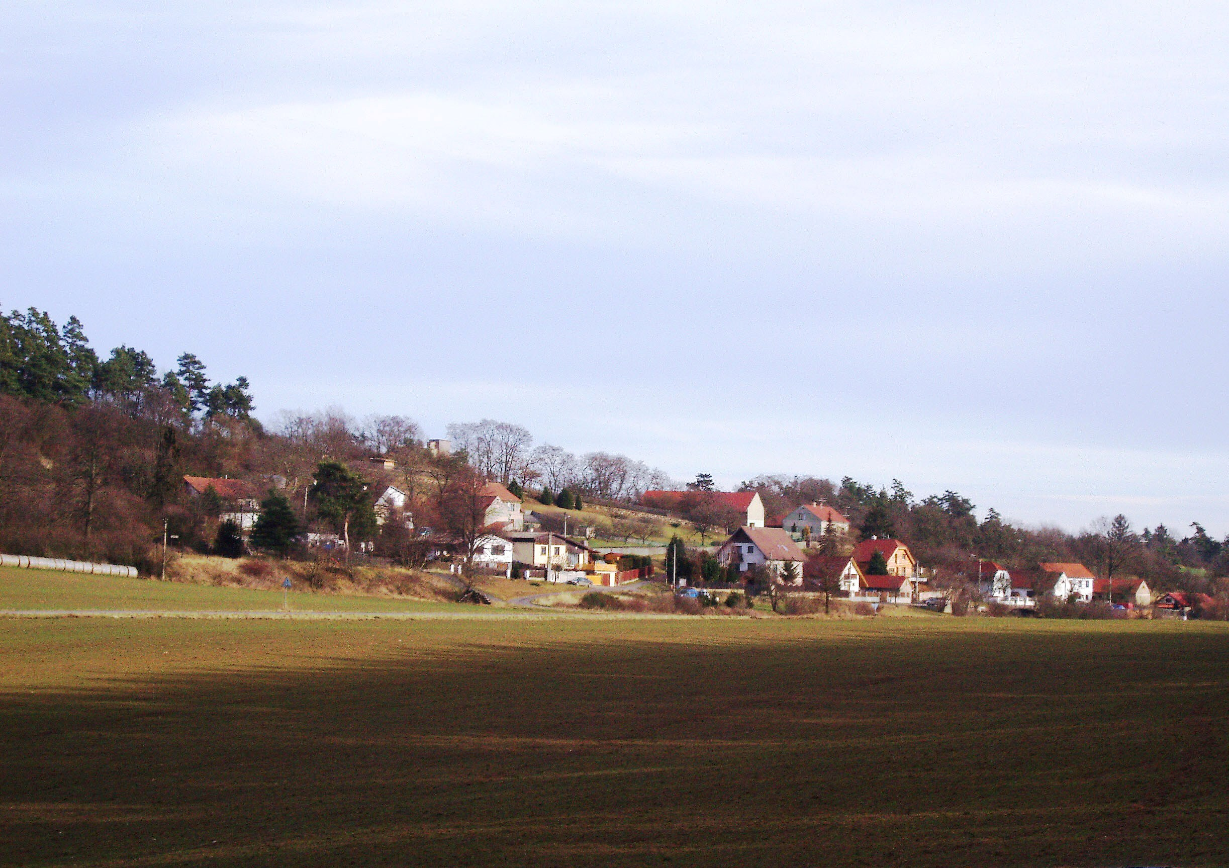 Nechalov,malá ves mezi Drhovy a Drevníky